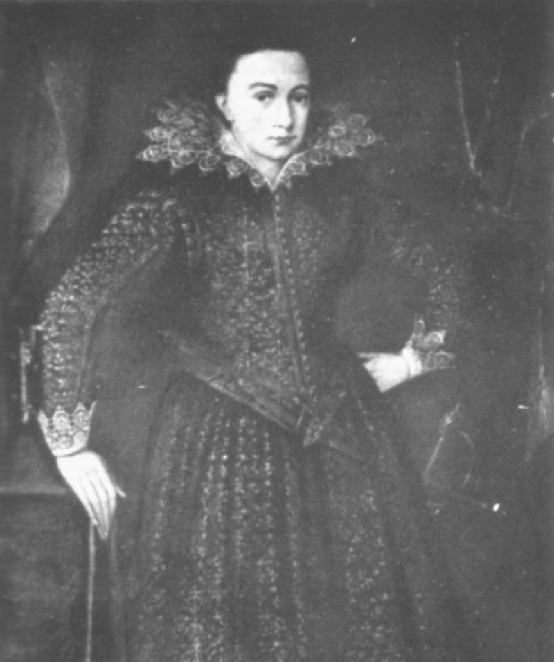 Graf Philipp Moritz von Hanau-Münzenberg, früher im Schloss Philippsruhe.